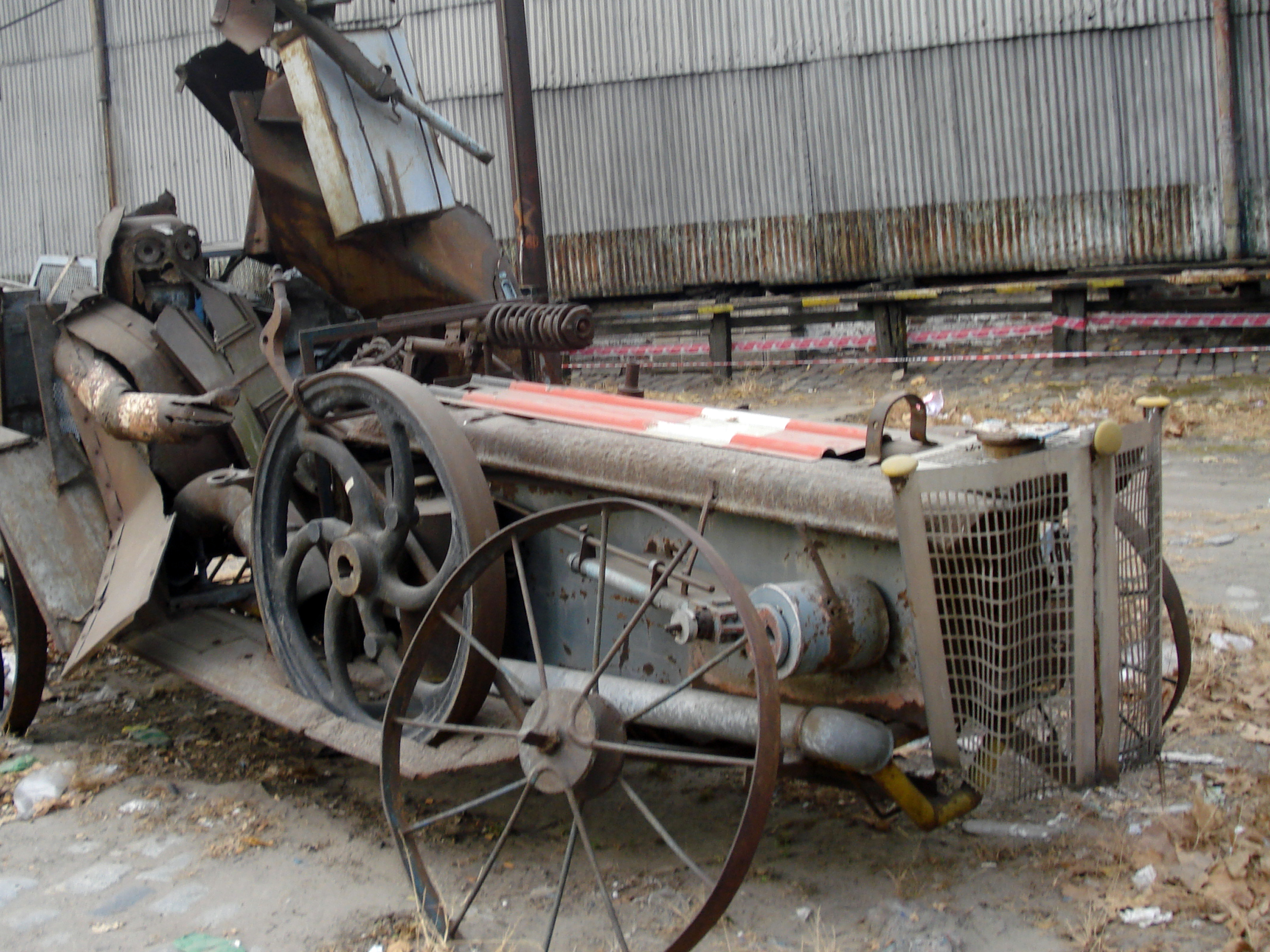 Obra del artista argentino Carlos Regazzoni.